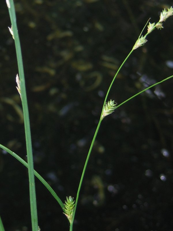 Winkel-Segge Carex remota, Kleiner Schwaberowsee, Mecklenburg-Vorpommern